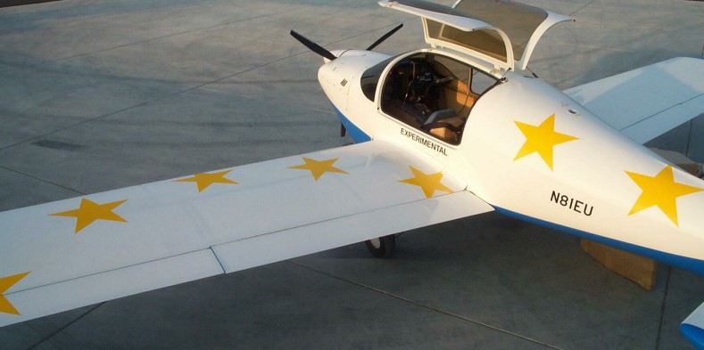 Europa N81EU Draufsicht